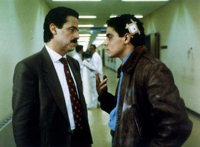 Screenshot del film Ultimo respiro.